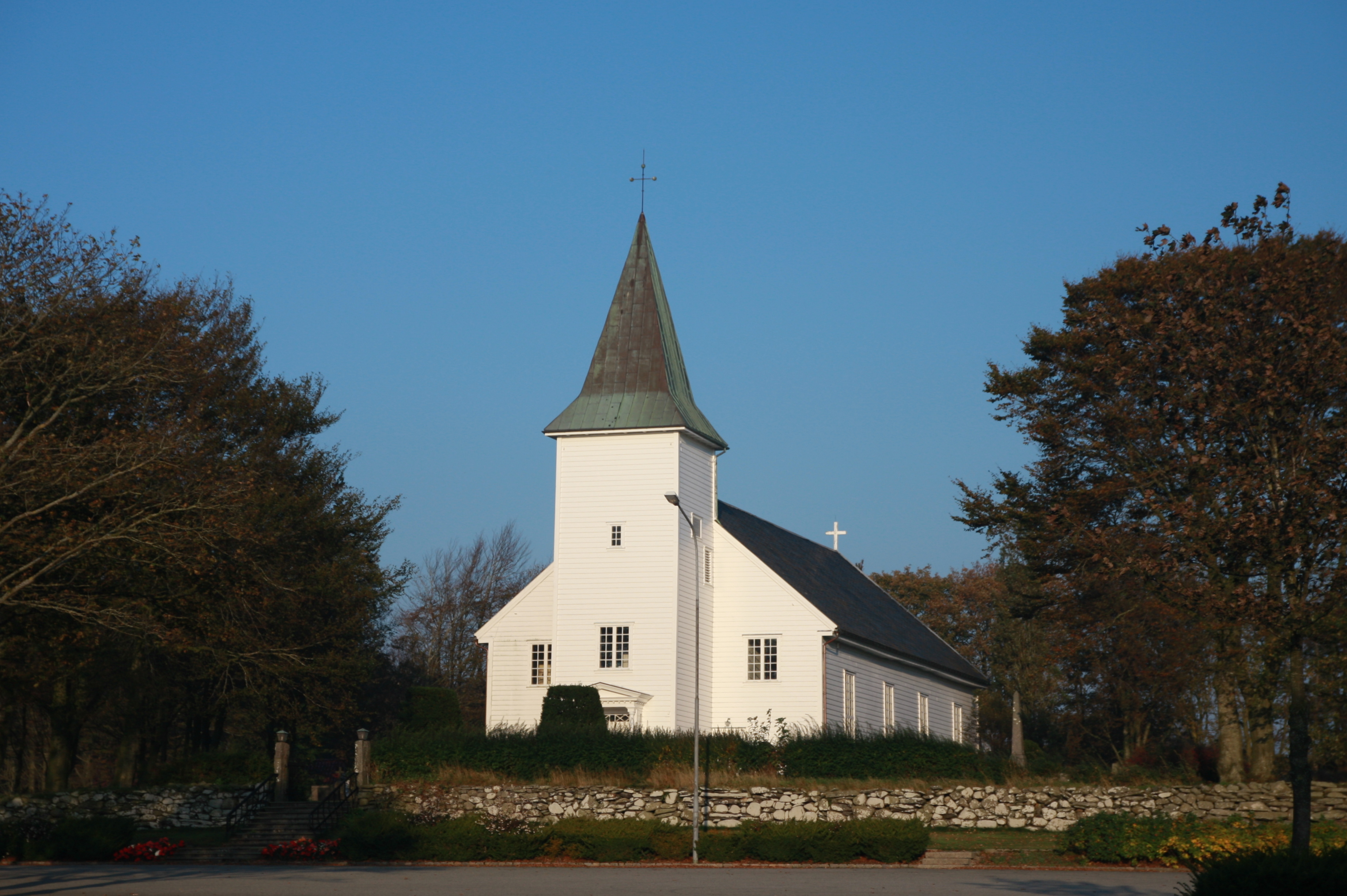 Time kyrkjestad